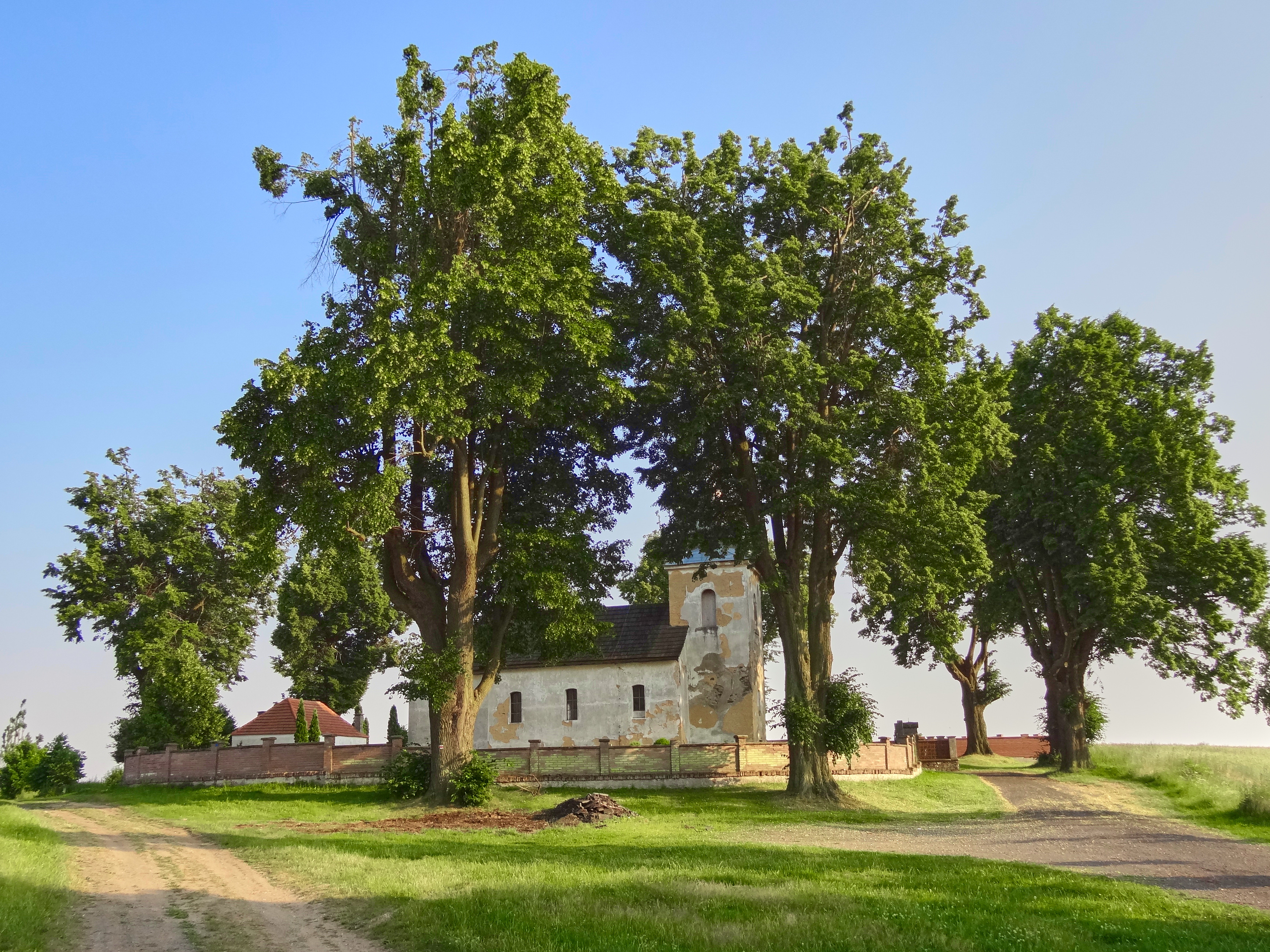 Kostel svatého Mikuláše, Verušice.